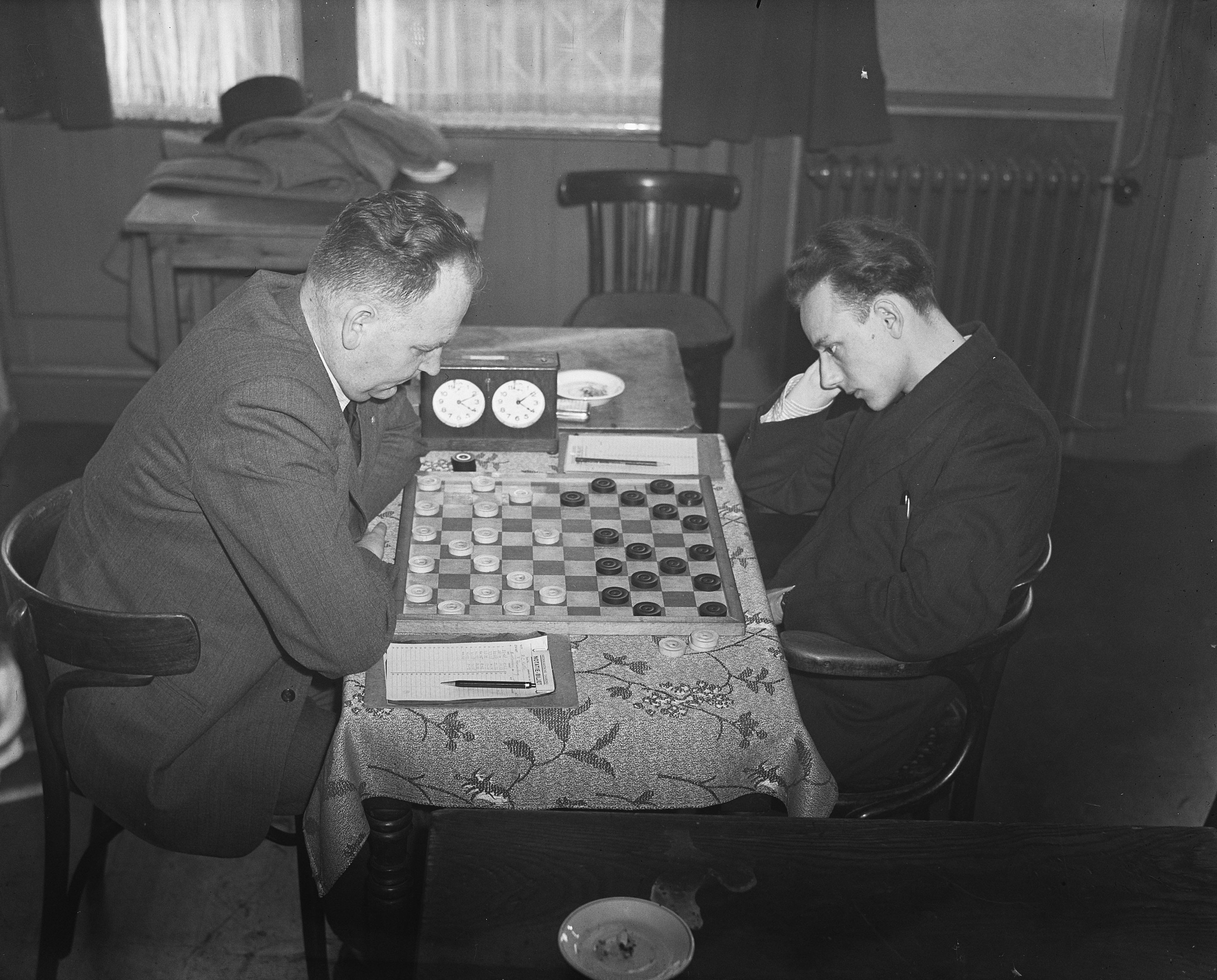 Collectie / Archief : Fotocollectie Anefo Reportage / Serie : [ onbekend ] Beschrijving : Nederlands Damkampioenschap Roozenburg-Keller Datum : 18 maart 1950 Trefwoorden : damkampioenschappen Fotograaf : Nijs, Jac. de / Anefo Auteursrechthebbende : Nationaal Archief Materiaalsoort : Glasnegatief Nummer archiefinventaris : bekijk toegang 2.24.01.09 Bestanddeelnummer : 903-8717